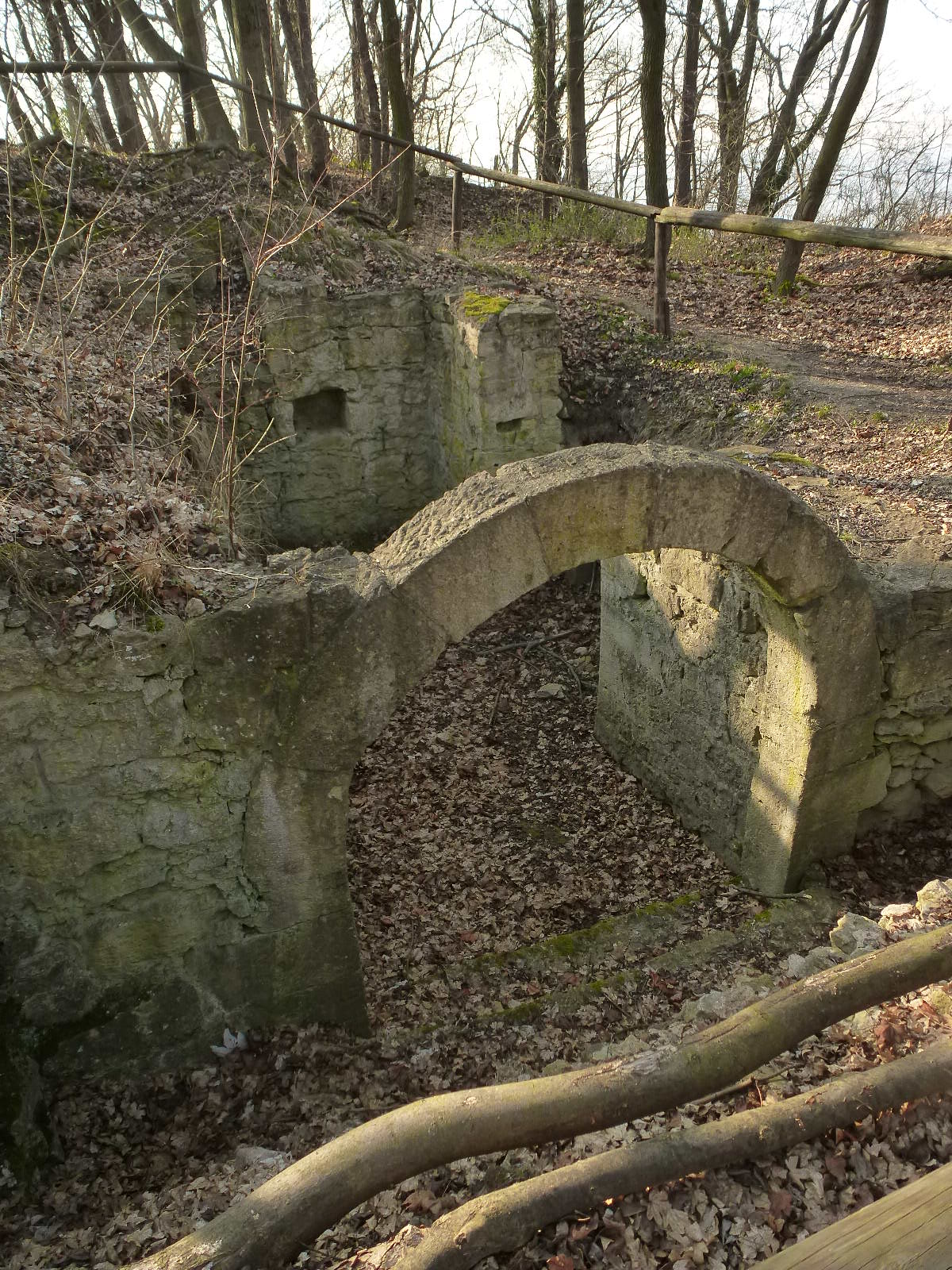 расокопанный в 1923-1926 гг. подвал крепости Винтберг около Йены, построенной примерно в 1200 г.